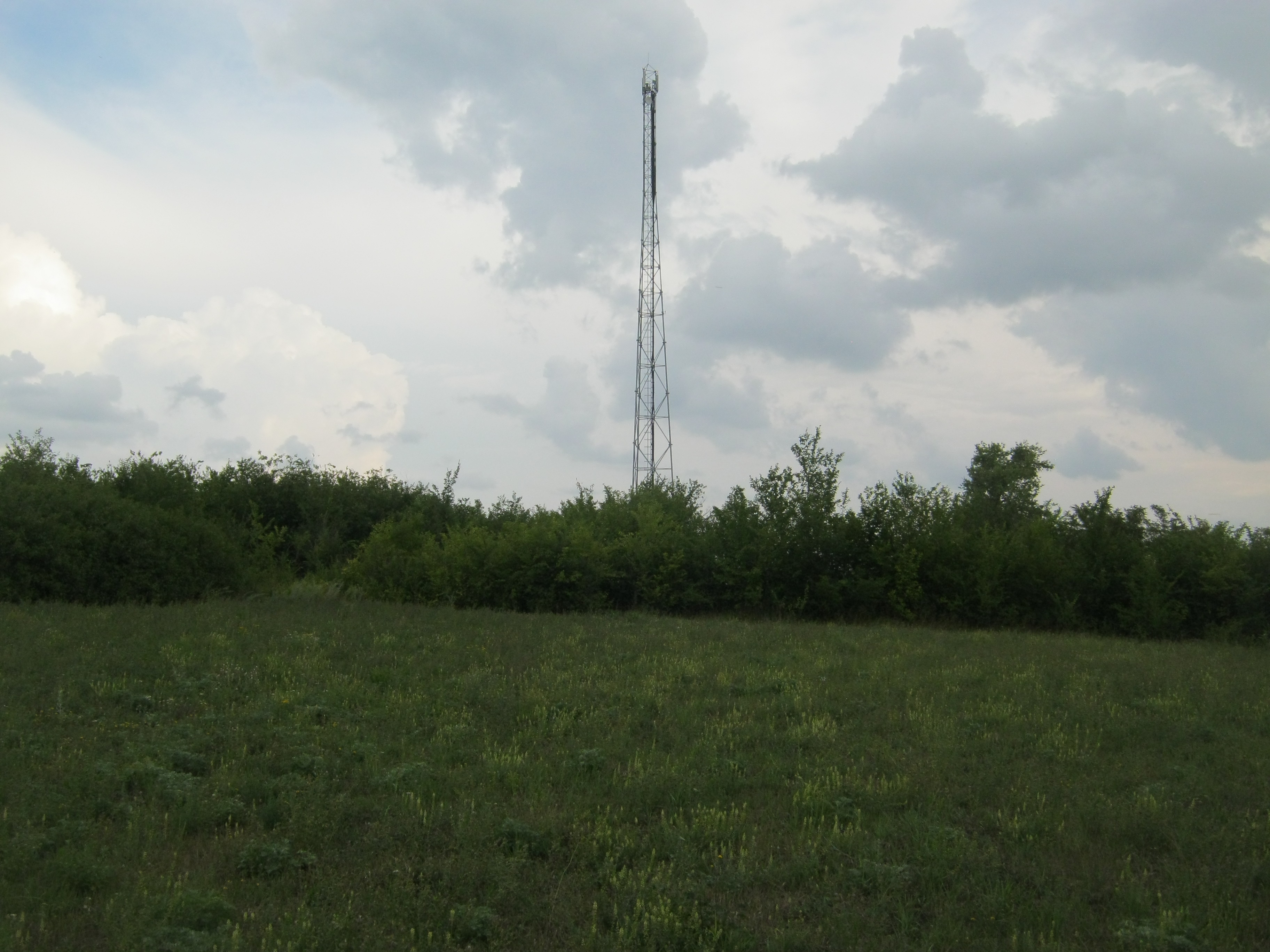 4g інтернет